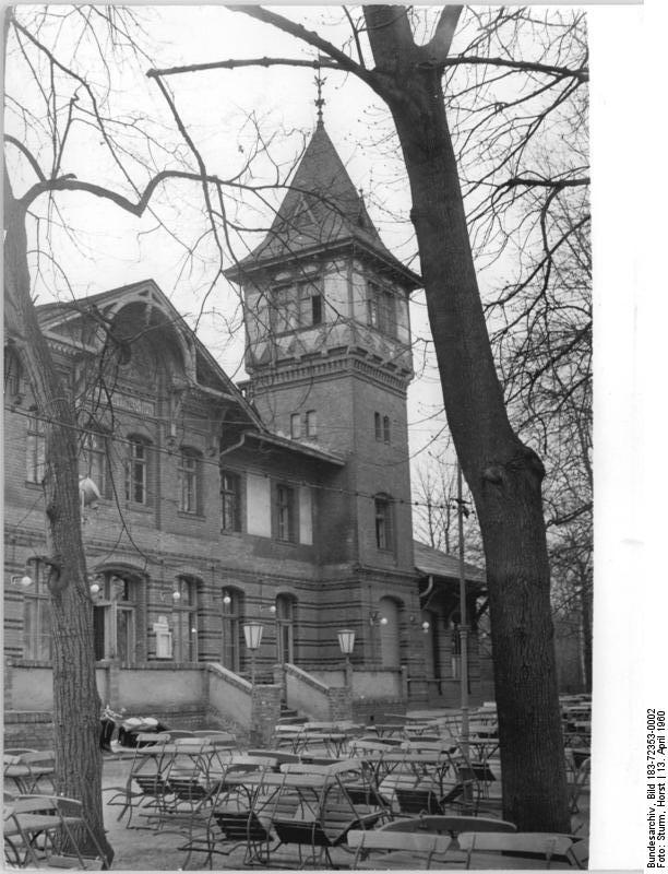 Berlin, Treptow, Gaststätte "Eierhäuschen" UBz: Blick zum Eierhäuschen.